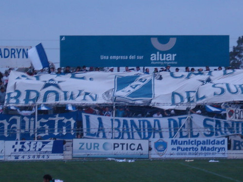 La Banda Del Sandia desplegando una bandera